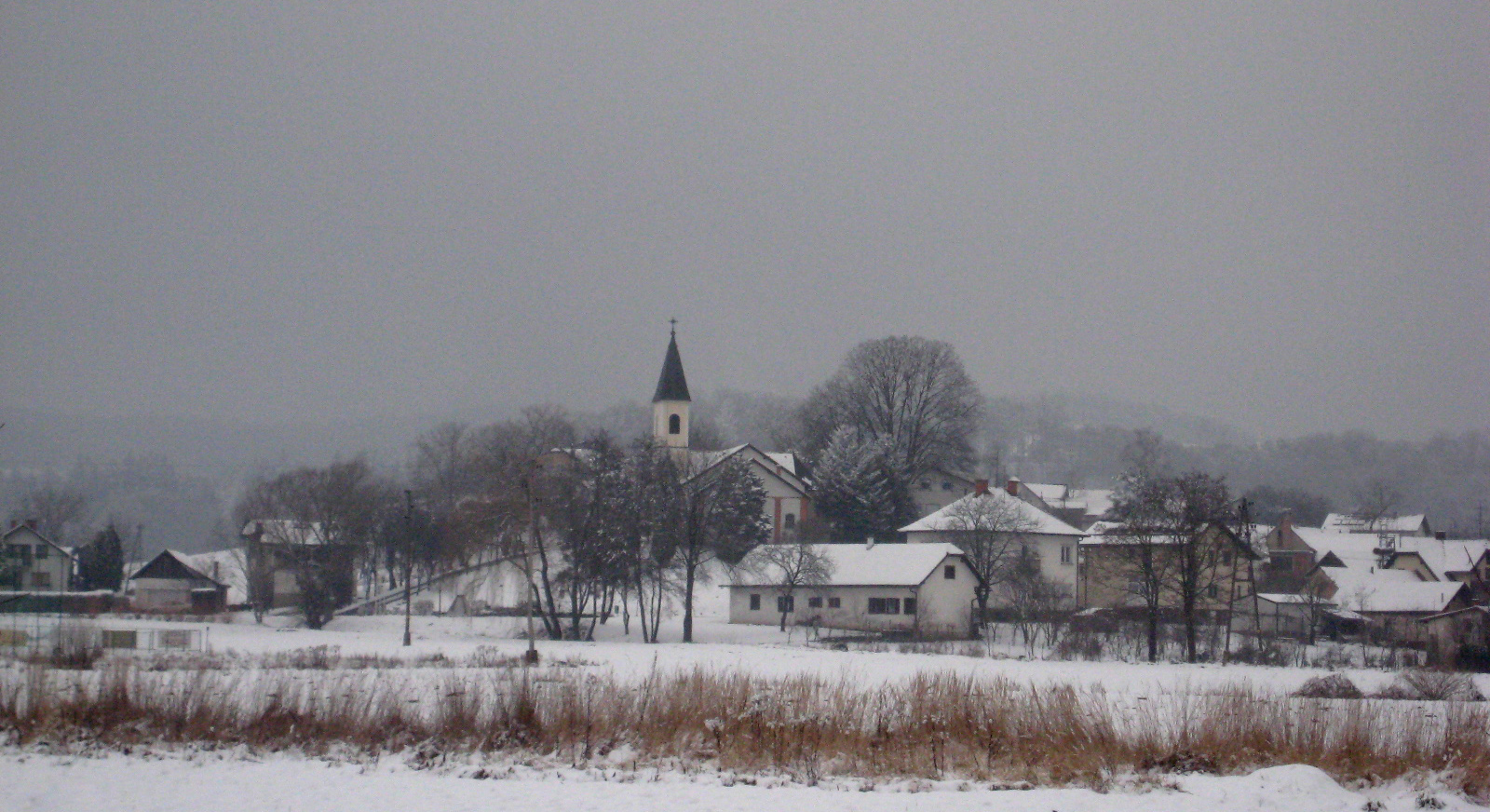 Kuzma, village in Goričko, Slovenia